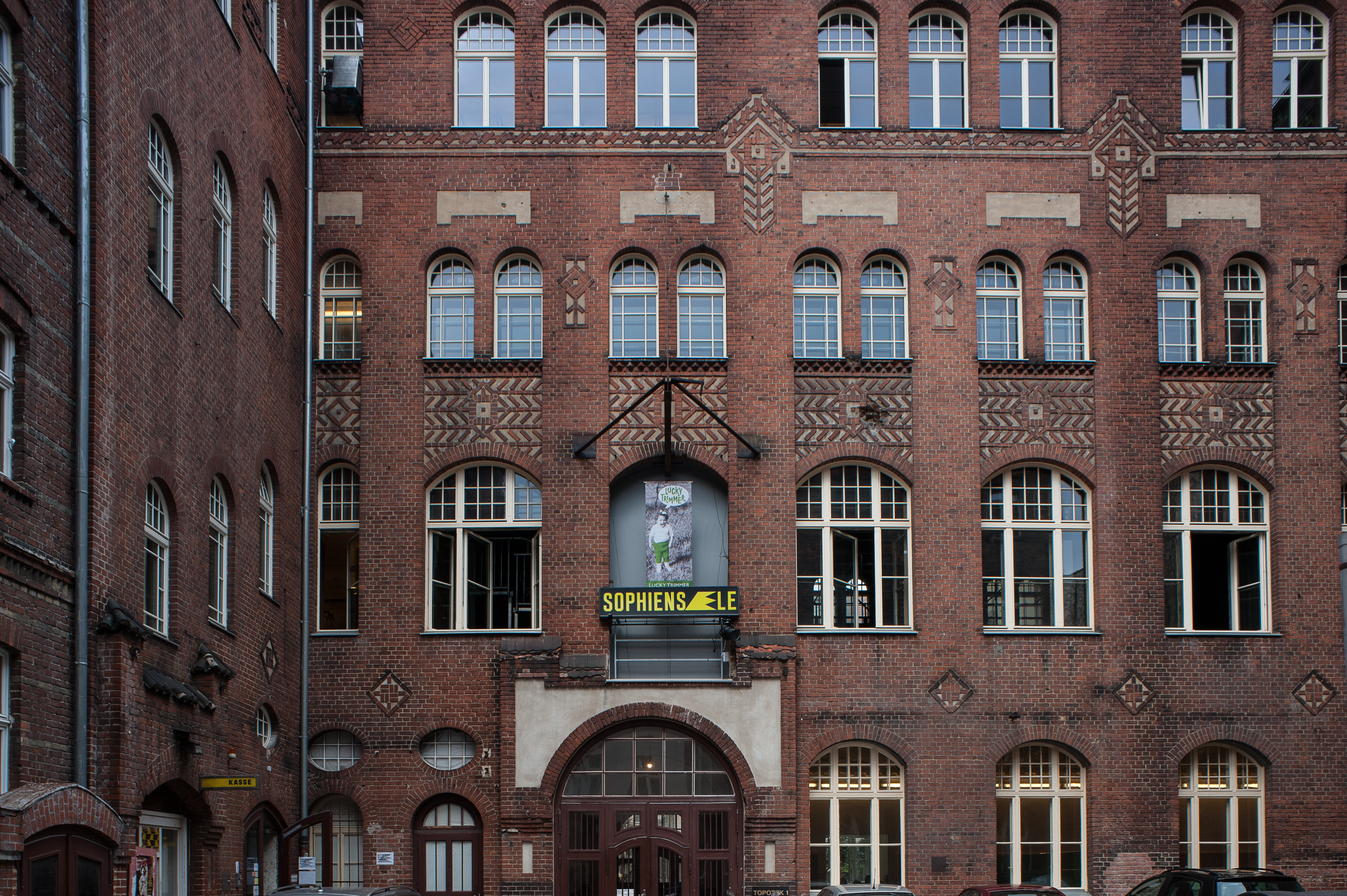 Außenfassade der Sophiensæle